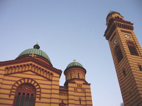 Church of Jagodina, Serbia/L'église des sains Pierre et Paul à Jagodina (Serbie)